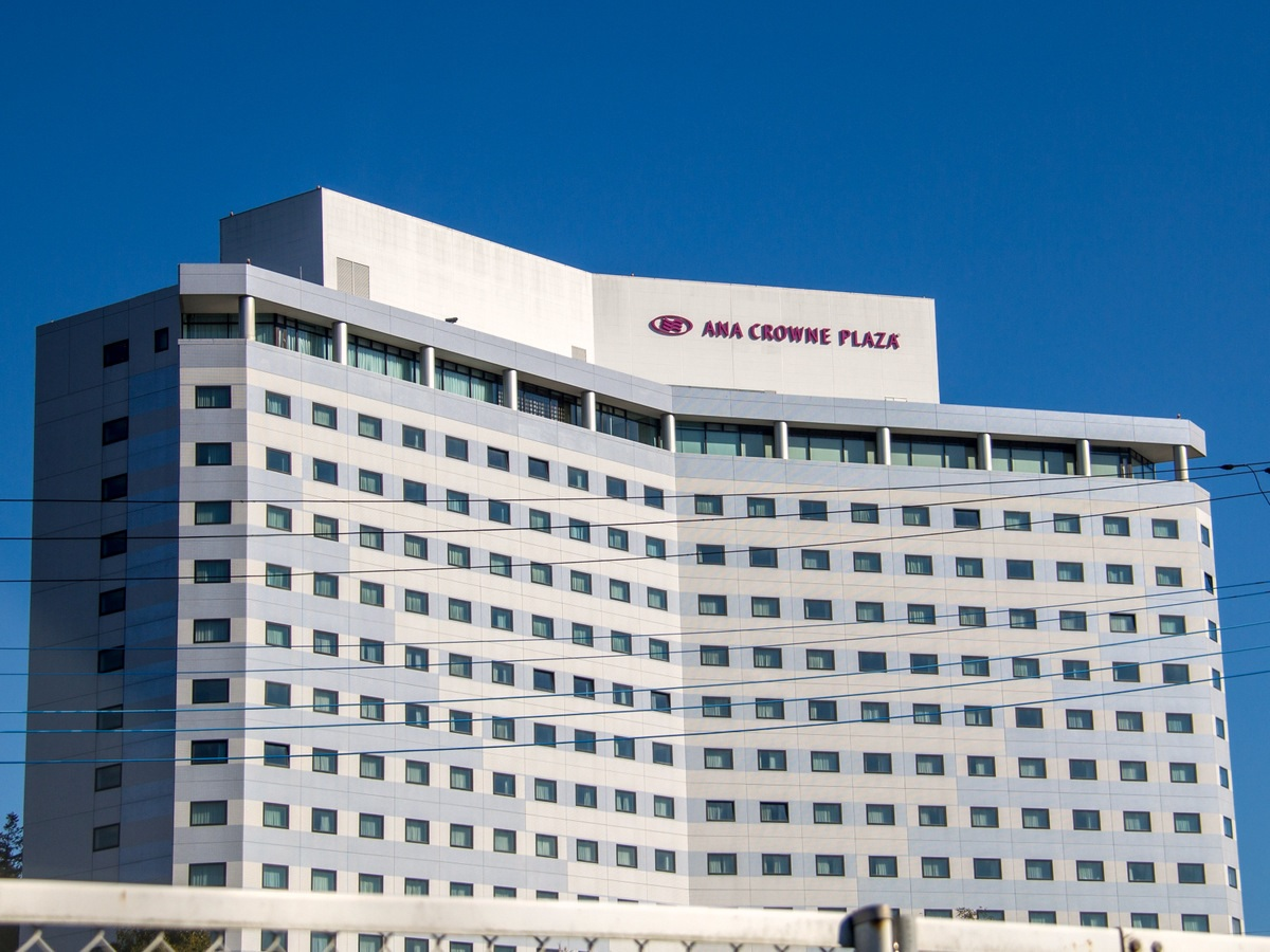 ANAクラウンプラザホテル成田